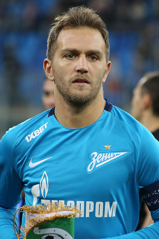 «Зенит» - чемпион! Как в Петербурге отметили 10-ю годовщину титула